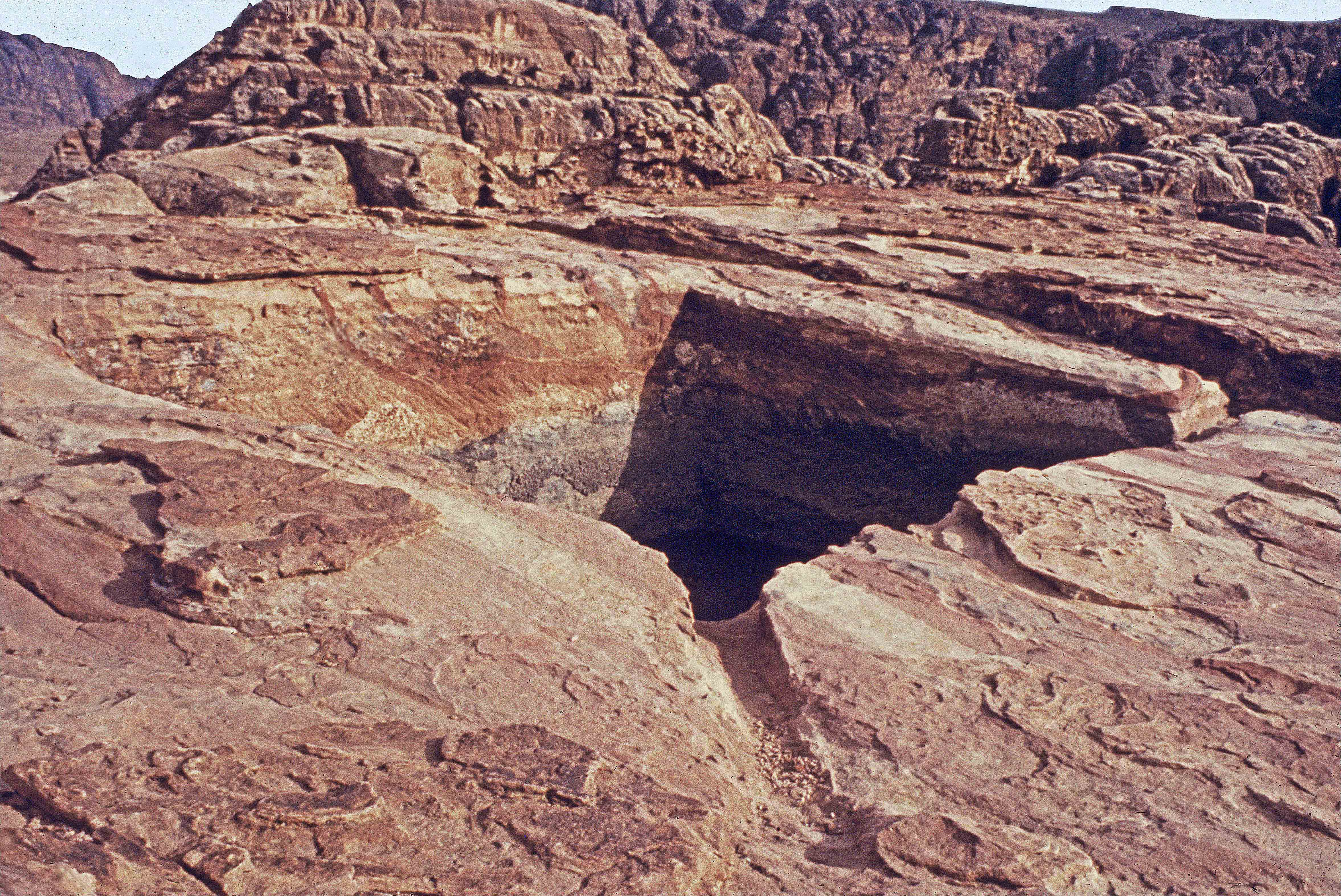 Citerne d'eau creusée dans le rocher du désert.